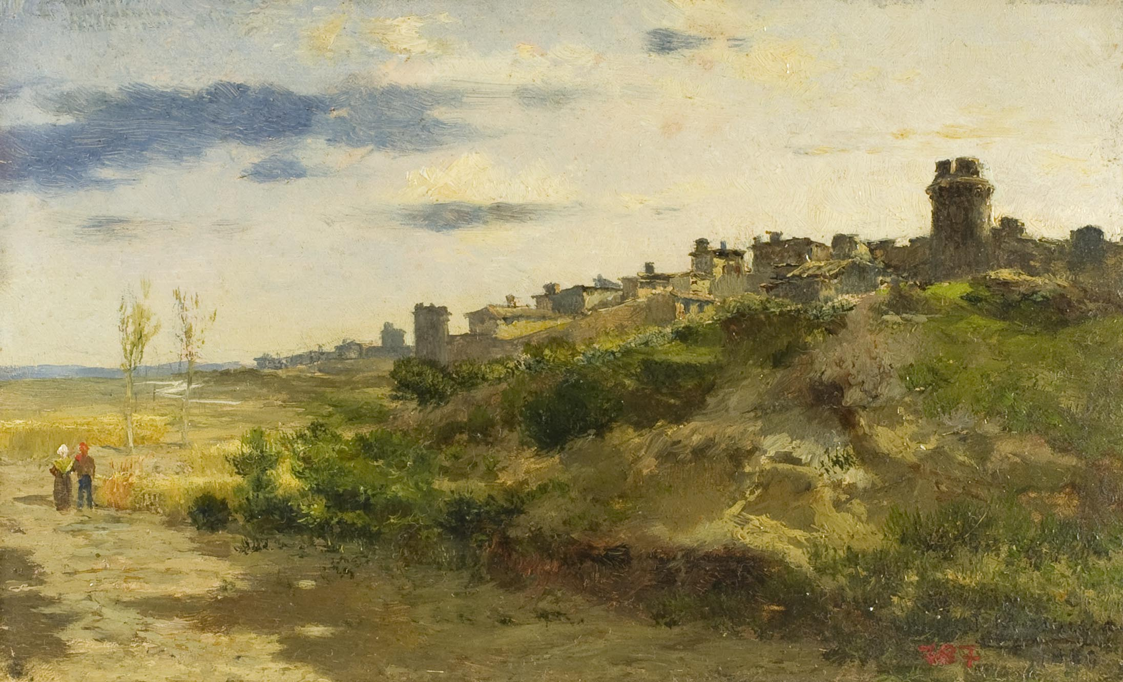 Museu Victor Balaguer.P.Baixa/Compacte Pintura 5. Núm.registre 787. Pintura sobre taula.Oli. Dimensions 13,5x21 cm.